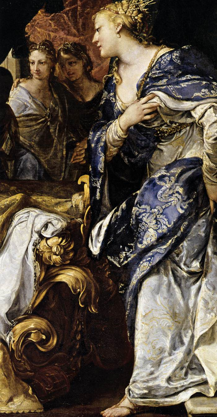 detail